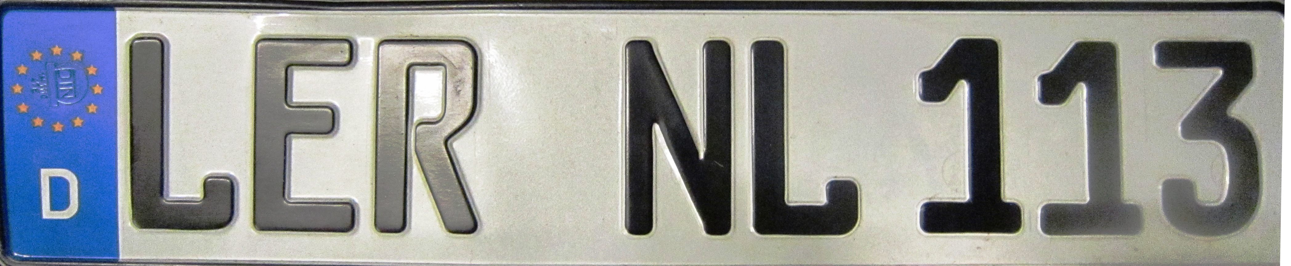 kentekenplaat Duitsland Leer